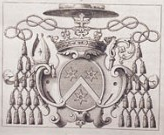 Blason de Mgr Hardouin de la Hoguette primat de Sens, sur le missel rédigé par lui.